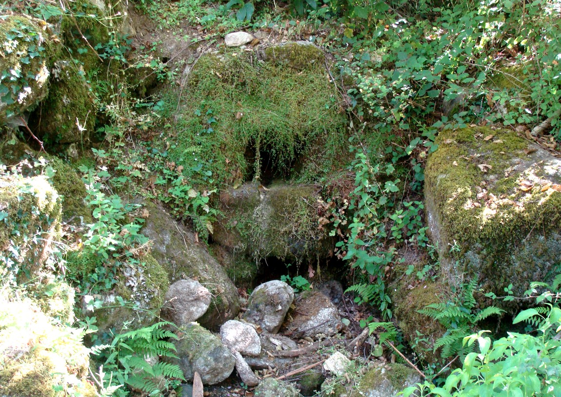 La fontaine de Vaccina, ancienne source captée, au bord de la route, à Bruschiccia, hameau de San-Gavino-di-Fiumorbo.